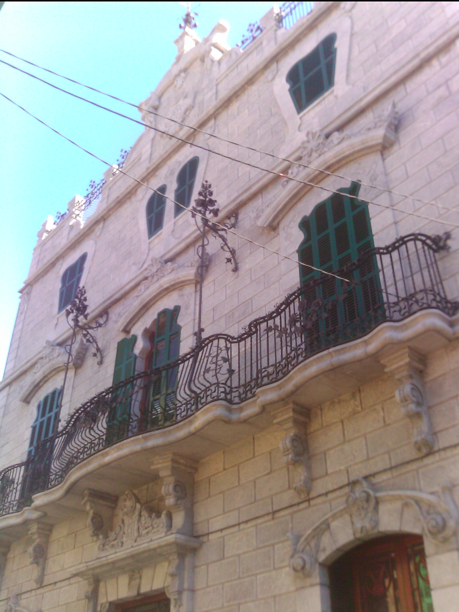 Can Prunera (Sóller)